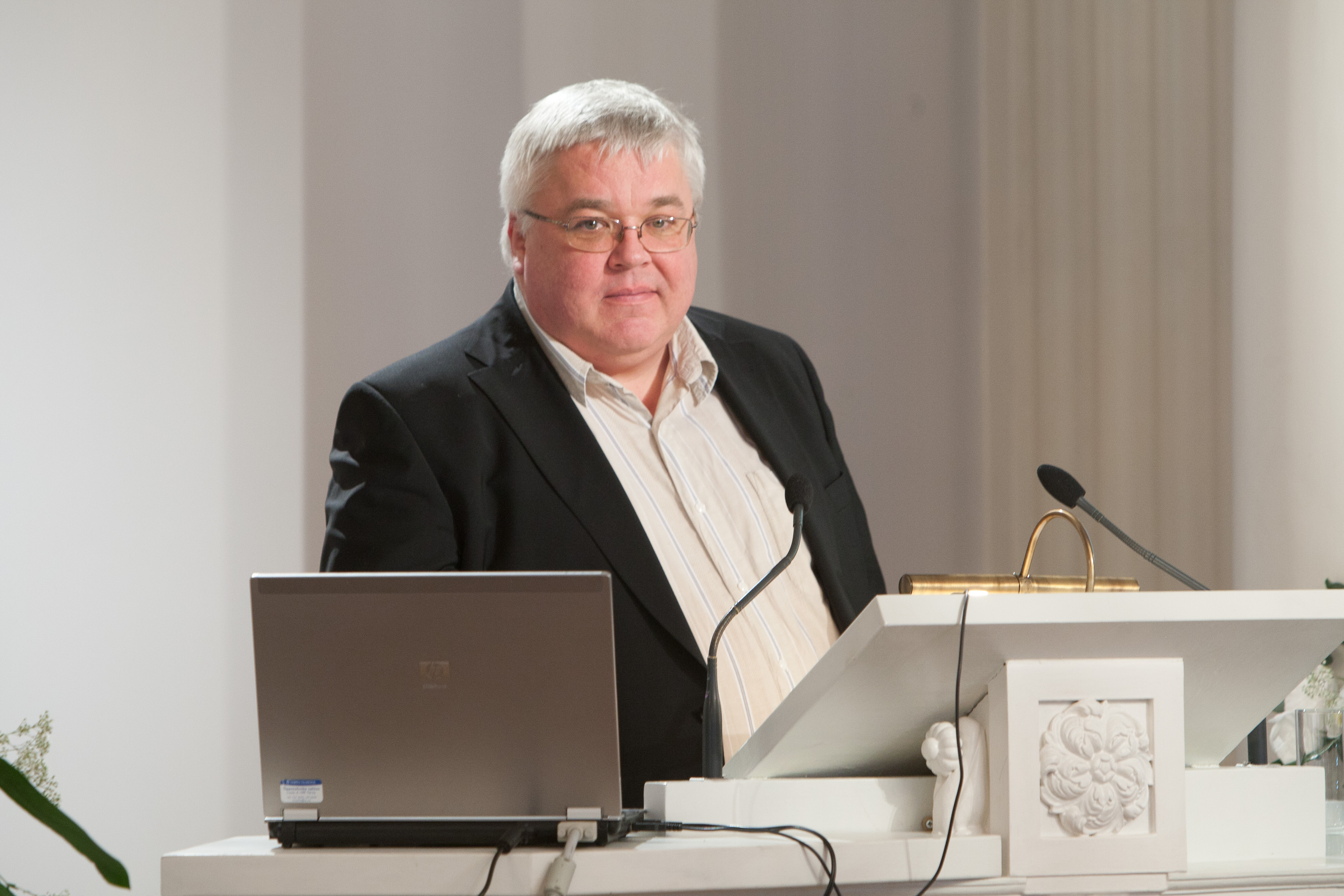 Tartu Ülikooli biokeemia instituudi prof Ursel Soomets esinemas ettekandega L. Puusepa nimelise Neuroloogide ja Neurokirurgide Seltsi talvesseminaril Tartu Ülikooli aulas 3. detsembril 2010.